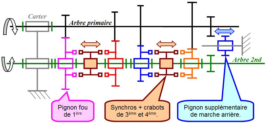 Schéma de principe d'une boîte de vitesses automobile à 4 rapports + MA (exécuté avec le module graphique de word). Chaque couleur correspond à un bloc compact. La position représentée correspond au point mort car tous les pignons fous sont libres en rotation par rapport à l'arbre secondaire. Les pignons fixes de l'arbre primaire sont rangés dans l'ordre croissant des rapports (gauche vers la droite). Les doubles flèches indiquent les mouvements des éléments coulissant (crabots et pignon de MA). Les systèmes de commande (fourchettes) ne sont pas représentés. Le pignon de MA n'est normalement pas dans le plan des arbres principaux; de ce fait le rapport proposé ne correspond pas à la réalité. voir liaison mécanique pour l'interprétation des symboles de liaison (pivot, pivot glissant et glissière).